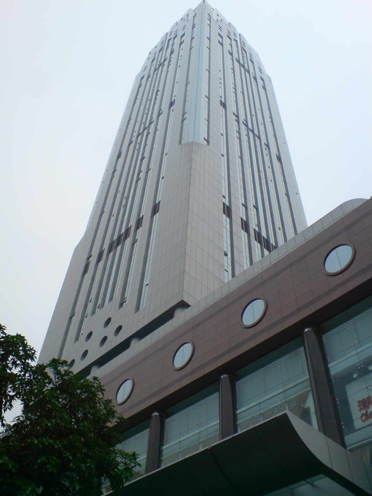 中文（中国大陆）: 位于广州越秀区的广东电信广场